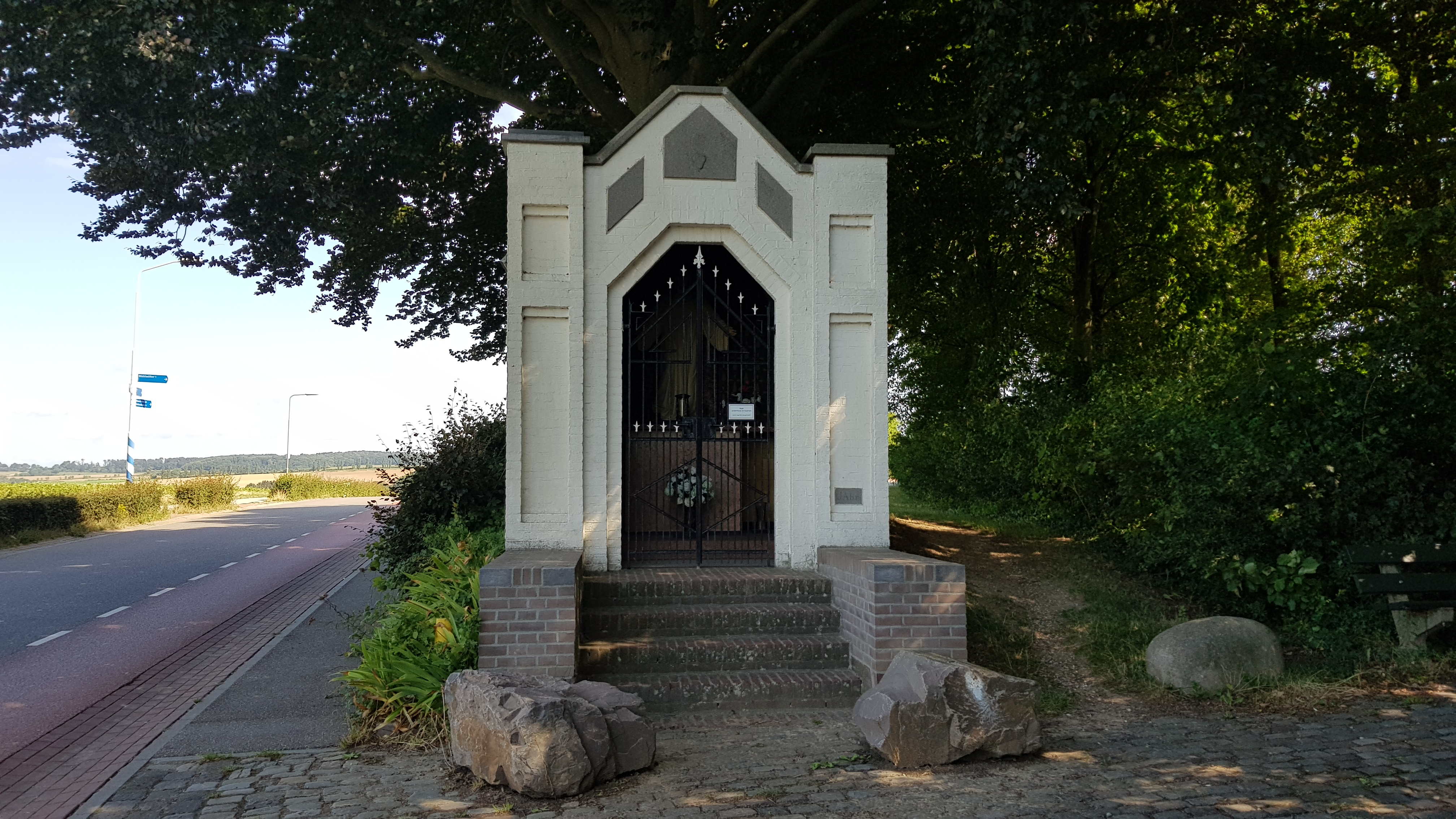 Heilig-Hartkapel ten noorden van Mechelen, Limburg, Nederland